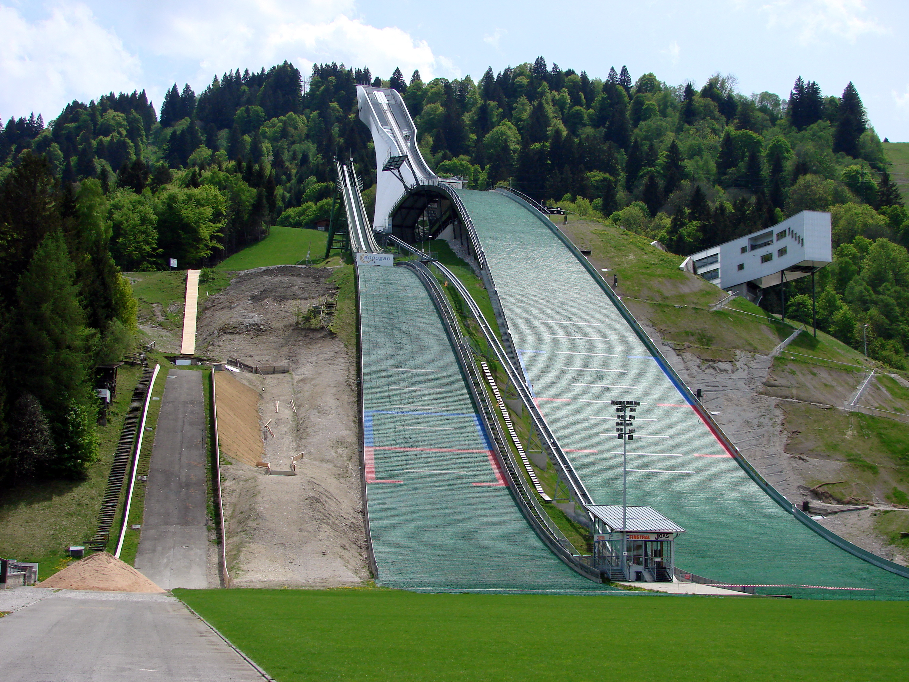 Olympiaschanze in Garmisch-Partenkirchen, Germany